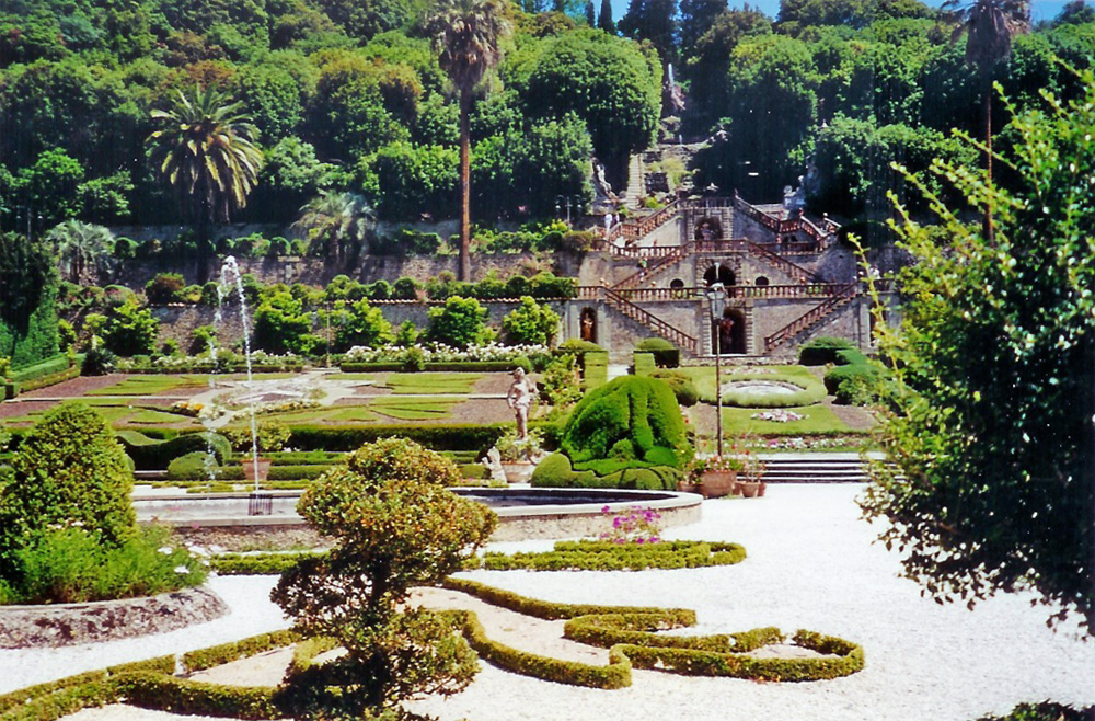 Villa Garzoni in Collodi, garden